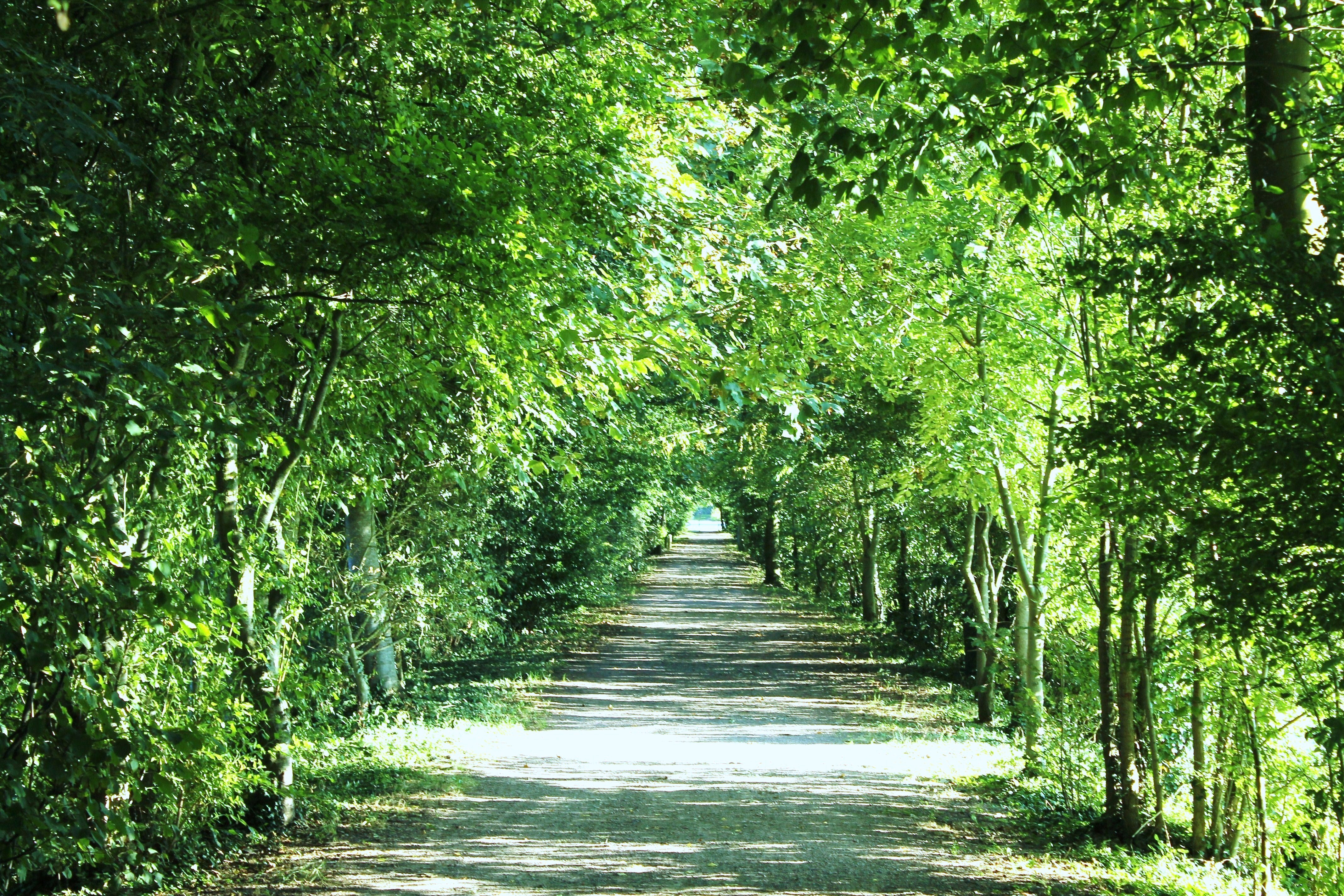 Le 9 juillet 1944, par ce chemin, la 59th Staffordshire Division britannique, venant de cambes-en-Plaine, dans le cadre de l'opération Charnwwod est entrée dans Épron (Calvados)